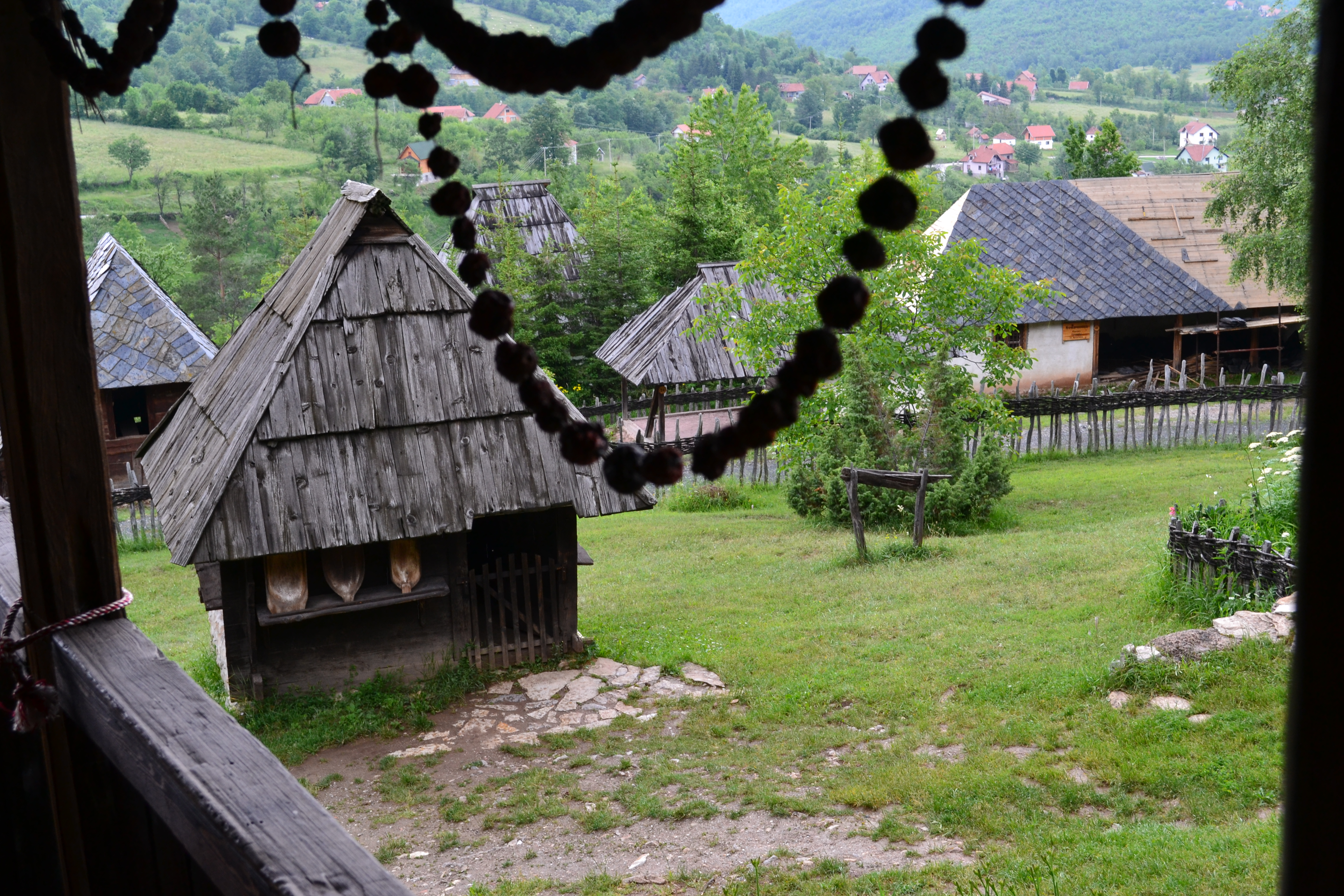 Ово је фотографија заштићеног природног добра у Србији под шифром: МПС26 This is a a photo of a natural area in Serbia with ID: МПС26